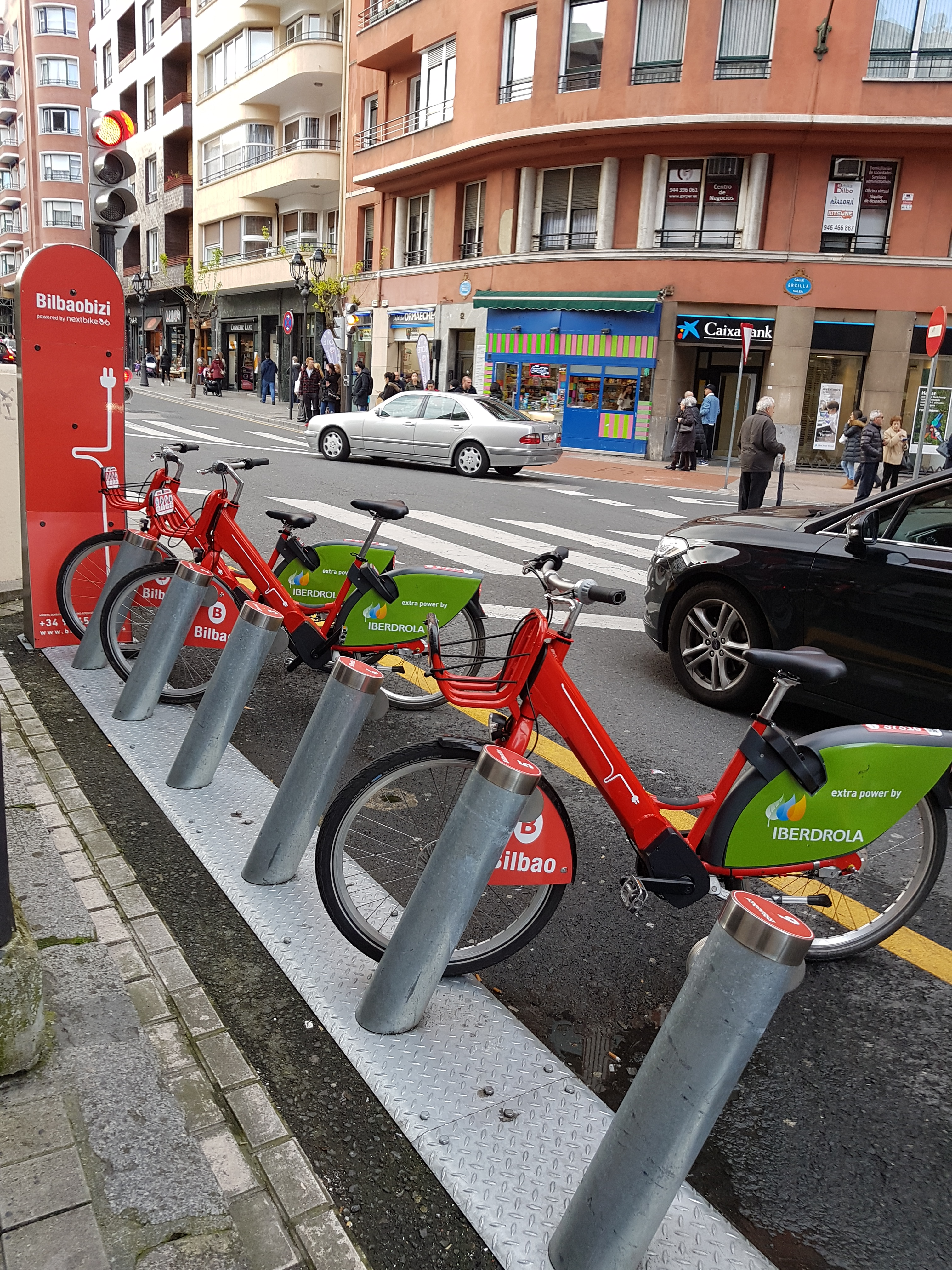 Bilbaobizi.